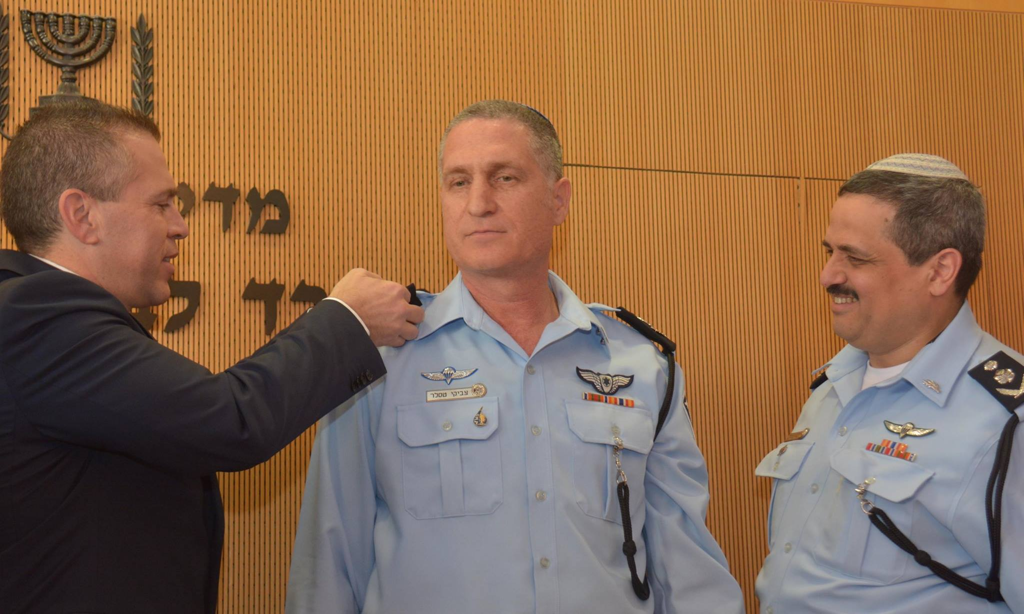 צבי טסלר